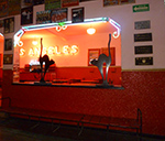 Quien No Conoce Los Angeles No Conoce México